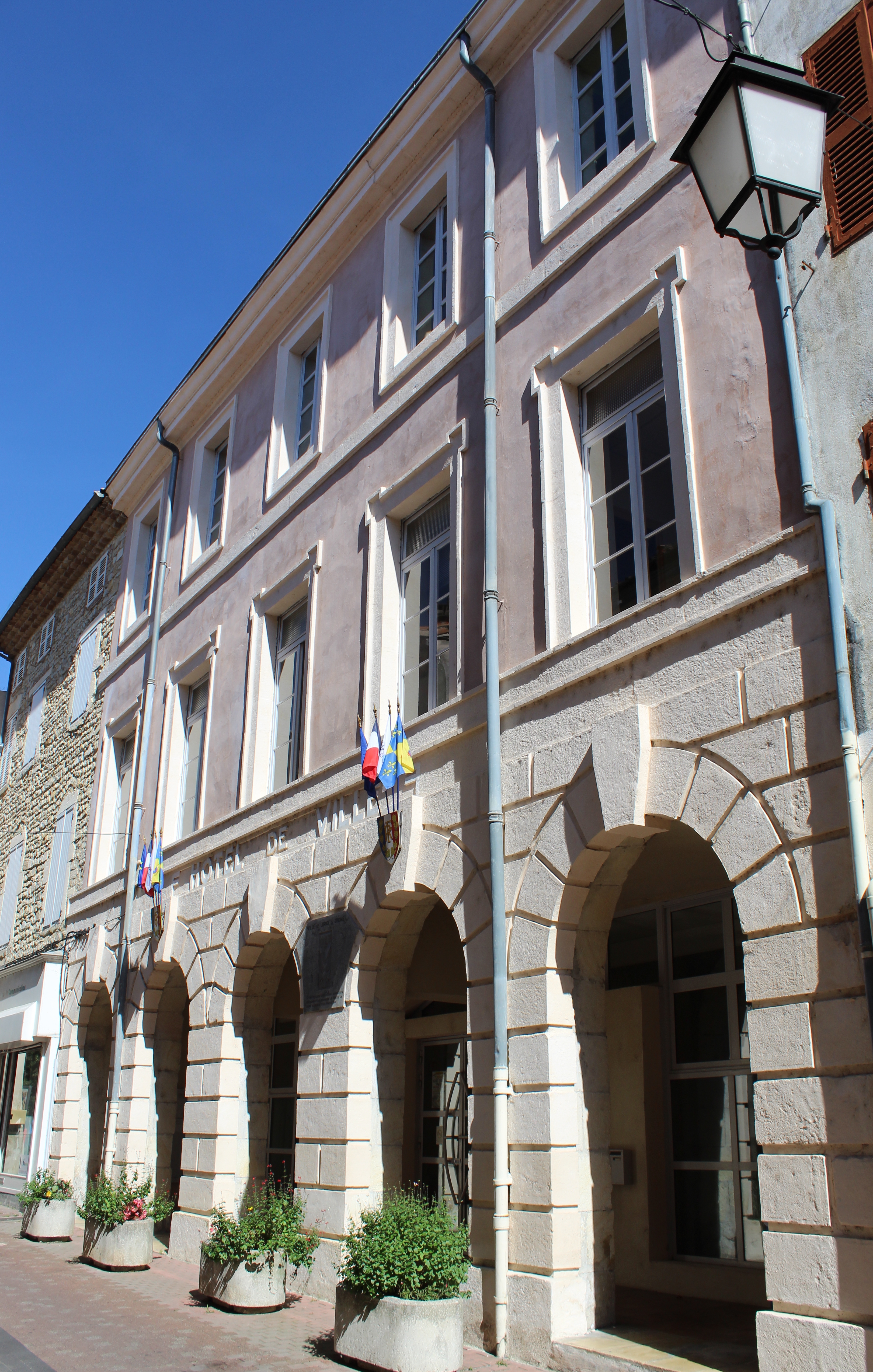 L'hôtel de Ville.